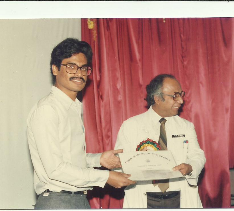 This is myself (Angajala Rajasekhar) receiving the Nalinibai Thakar Prize during the 1987 Annual conference of Indian Academy of Cytologists from the Director, Kidwai Memorial Cancer Institute, BangaloreRajasekhar1961 (talk) 07:21, 12 April 2017 (UTC)